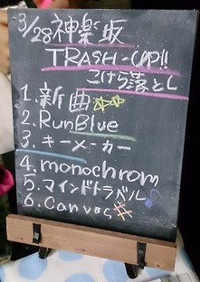 amiinaセトリボード(20150328(1))